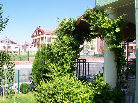 Güzelkent Eryaman Ankara